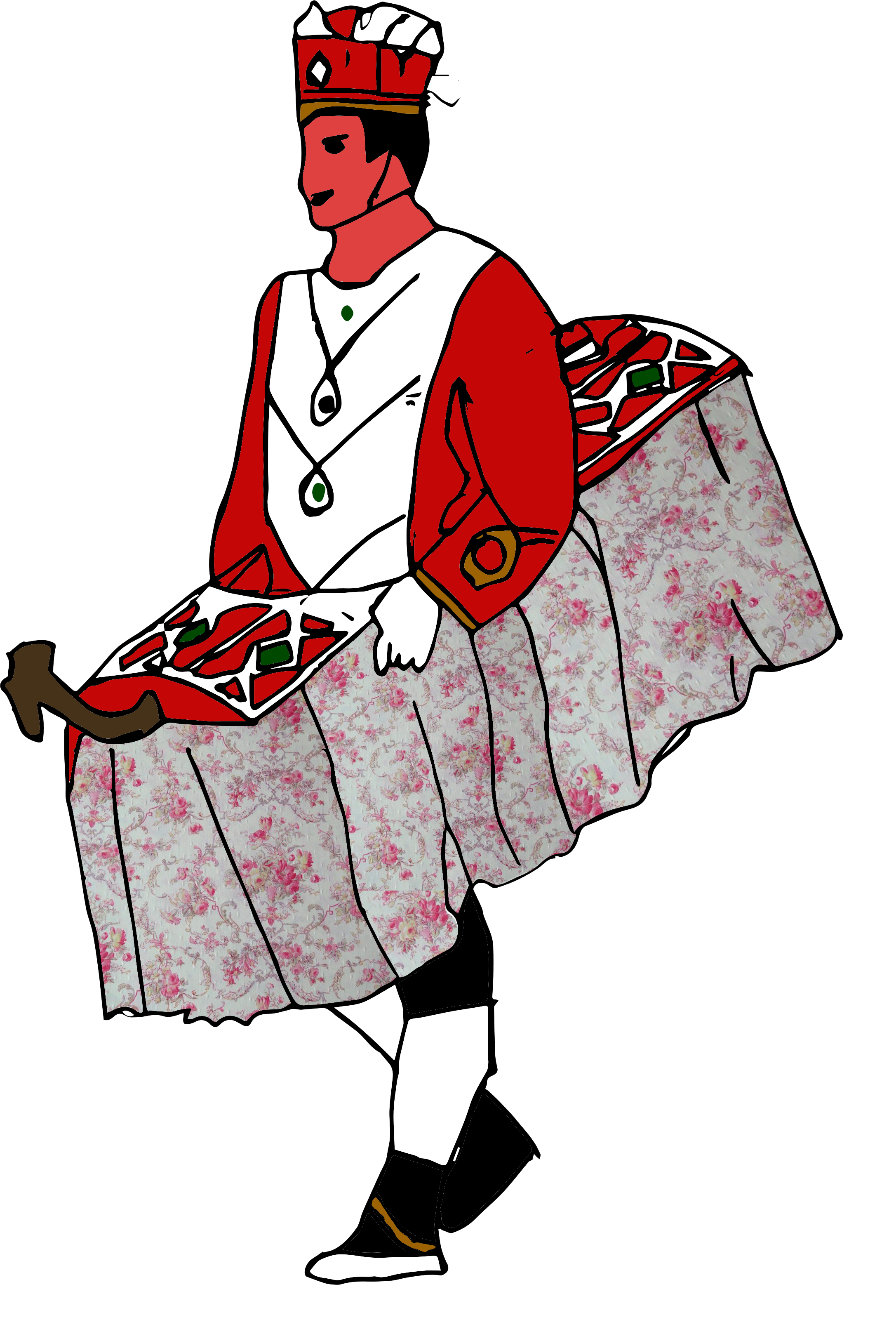 Zuberoako zamaltzainen ilustrazioa